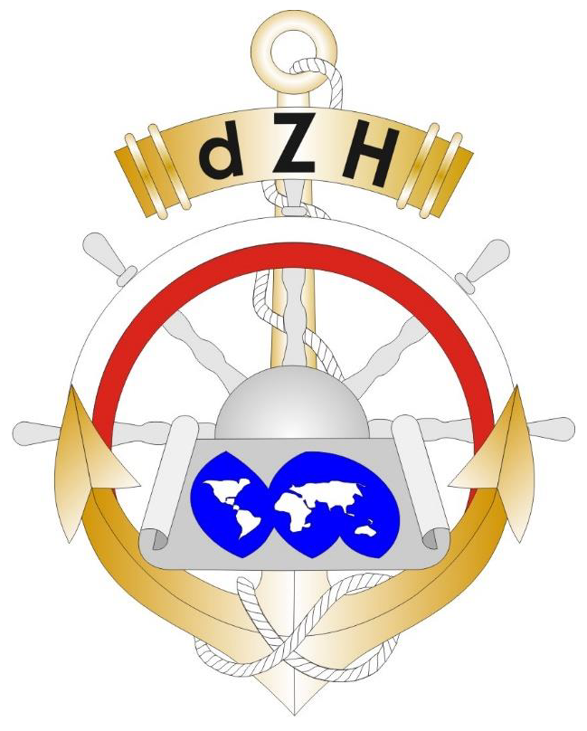 Dywizjon Zabezpieczenia Hydrograficznego Marynarki Wojennej – odznaka pamiątkowa – 2019, Polska.